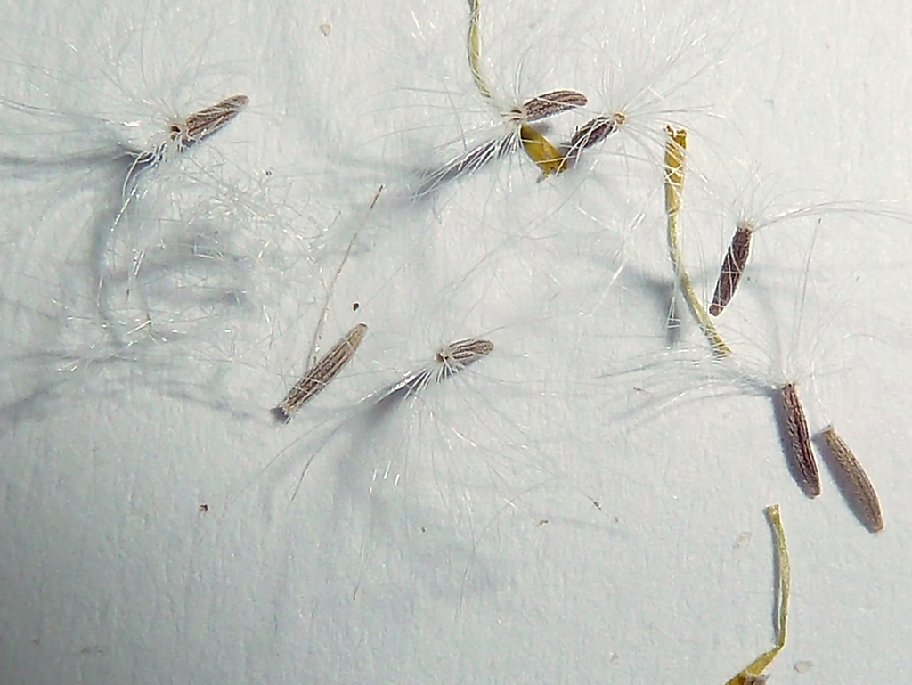 Senecio vulgaris (Hierba cana) : Cipselas sueltas - Madrid (España).